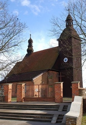 Łubnice, ul. Gen. Sikorskiego 1 - kościół p.w. Wniebowzięcia NMP (zabytek nr 980 z 30.12.1967)